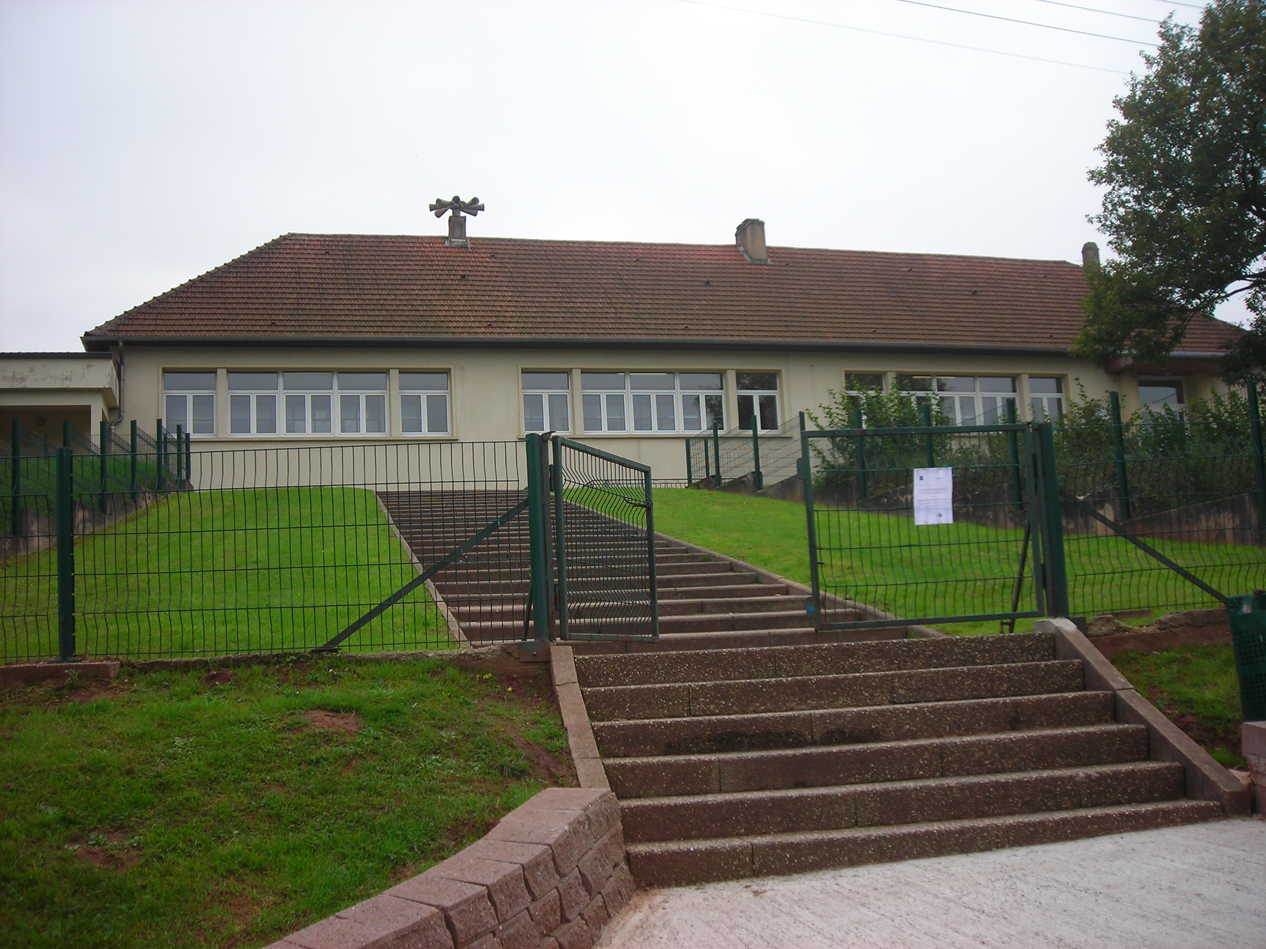 Ecole de Guerting (Moselle, France)